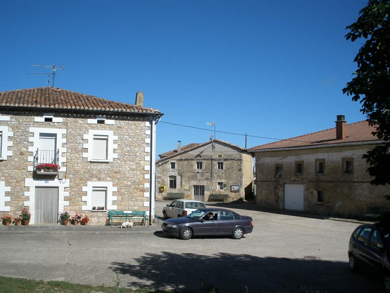 Fuente Úrbel (municipio de Basconcillos del Tozo, Burgos)